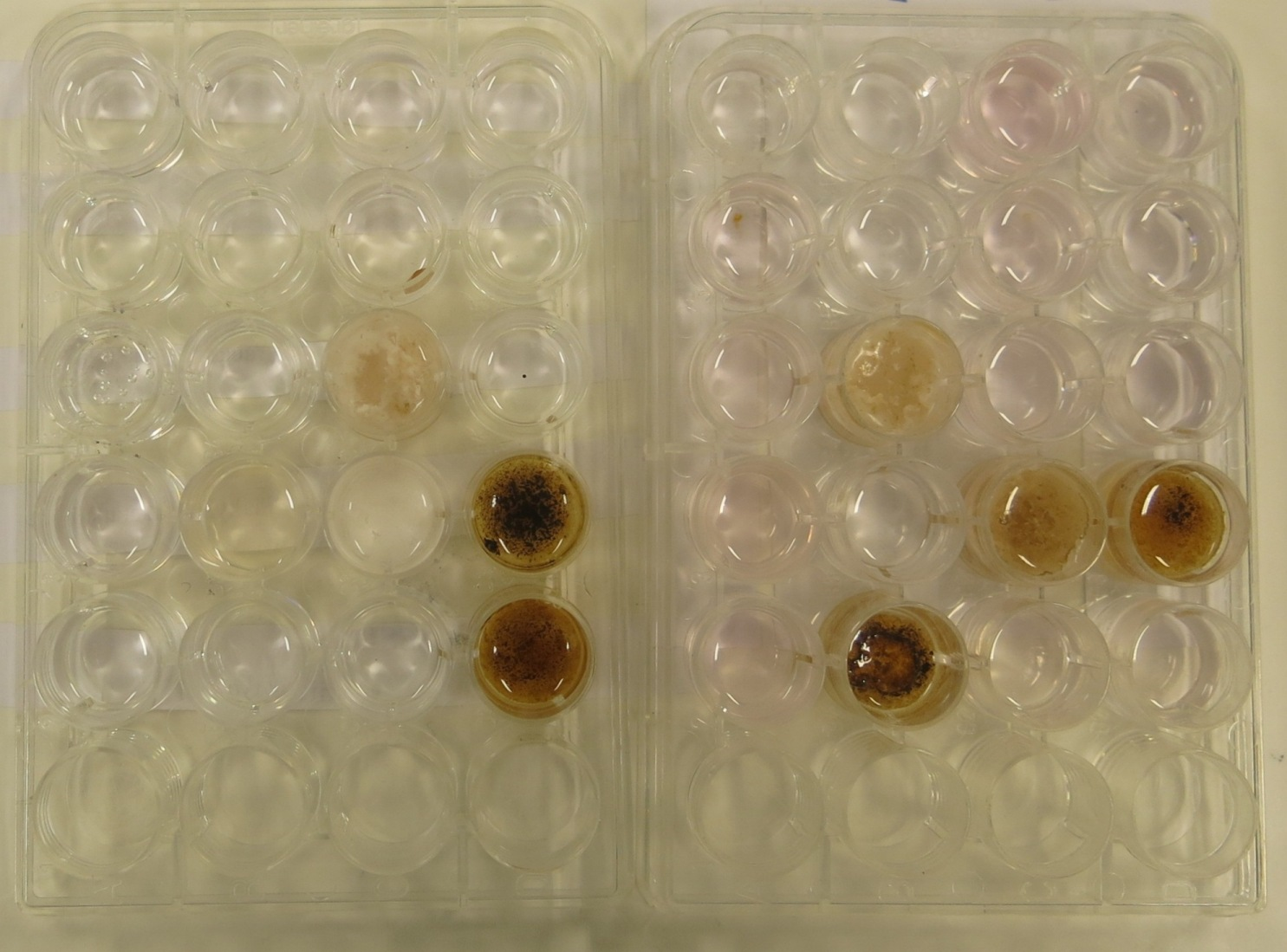 Tuntemattomien aineiden tutkiminen saostuskokeilla